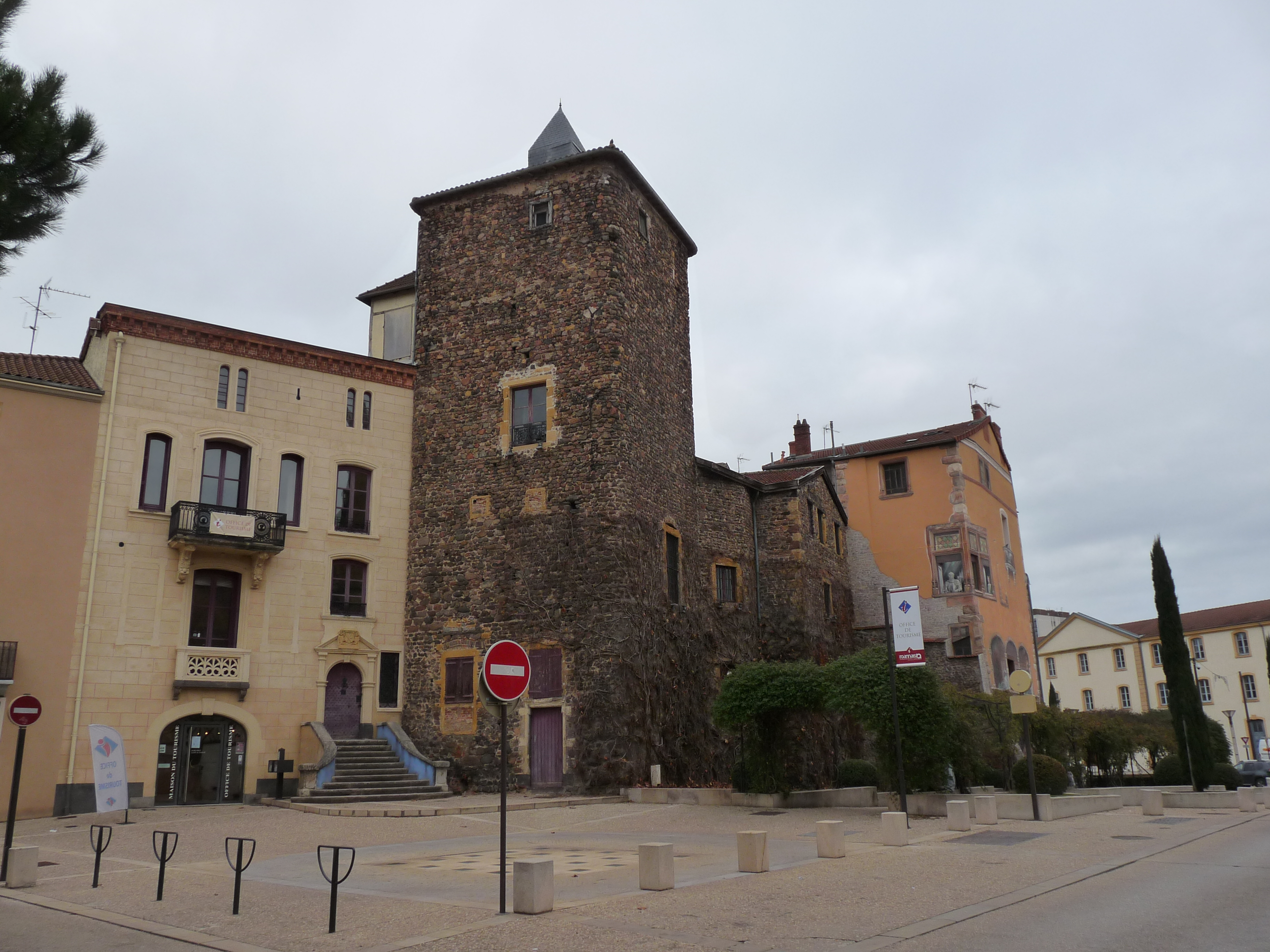 Overgebleven toren van het oude kasteel